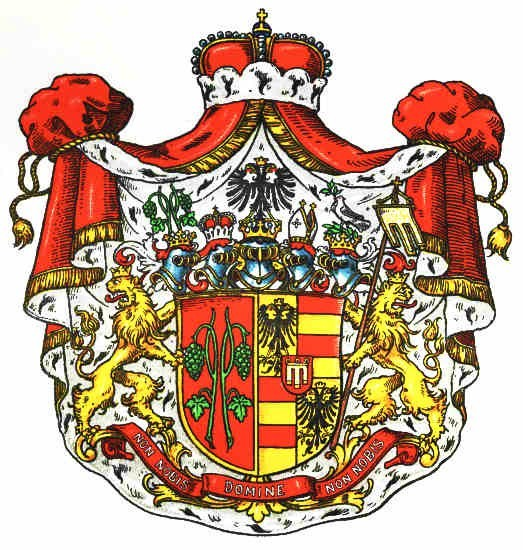 Wappen der Fürsten Lichnowsky, Grafen von Werdenberg, Freiherren und Edlen Herren von Woschütz.